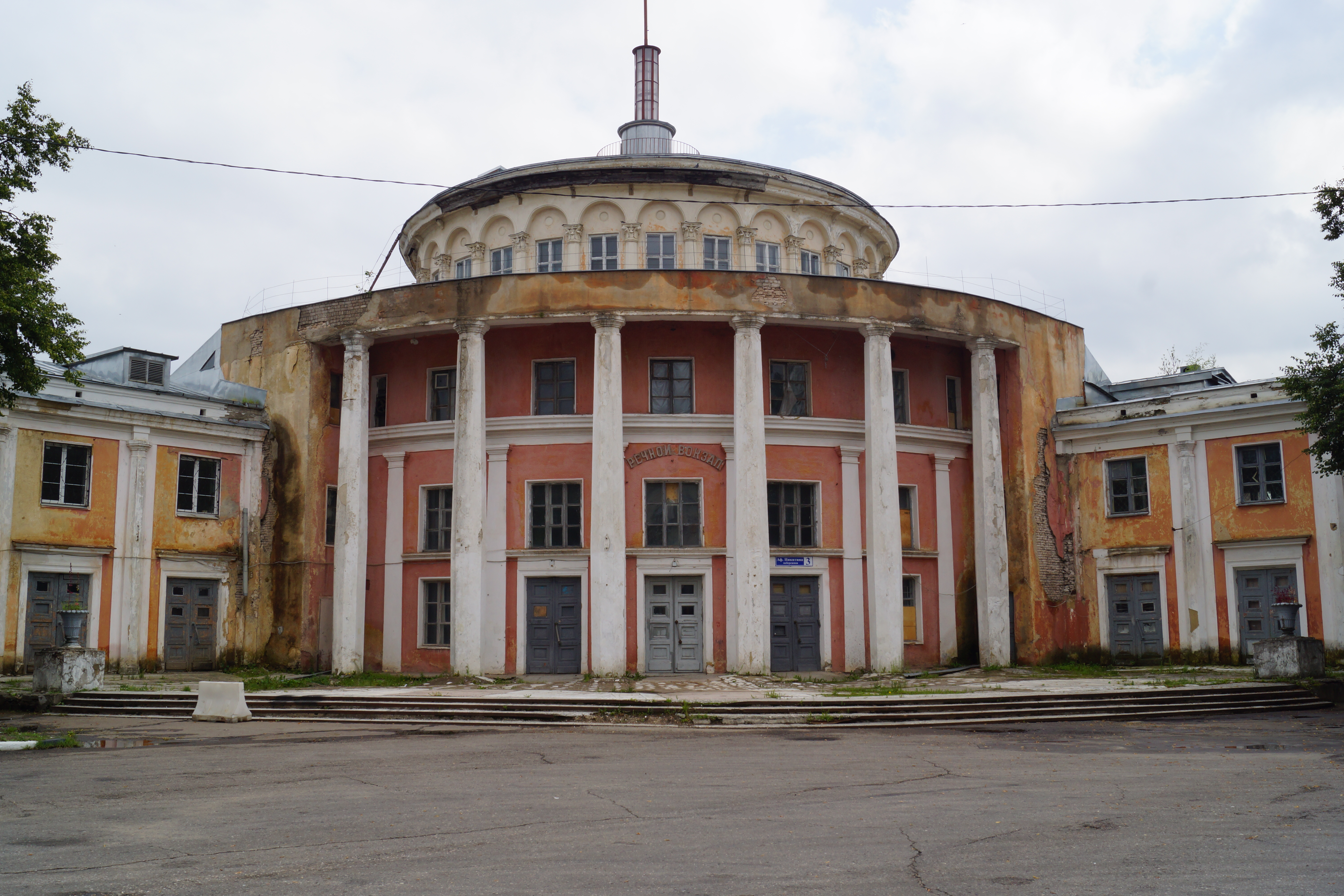 Речной вокзал: набережная Афанасия Никитина, Тверь, Тверская область